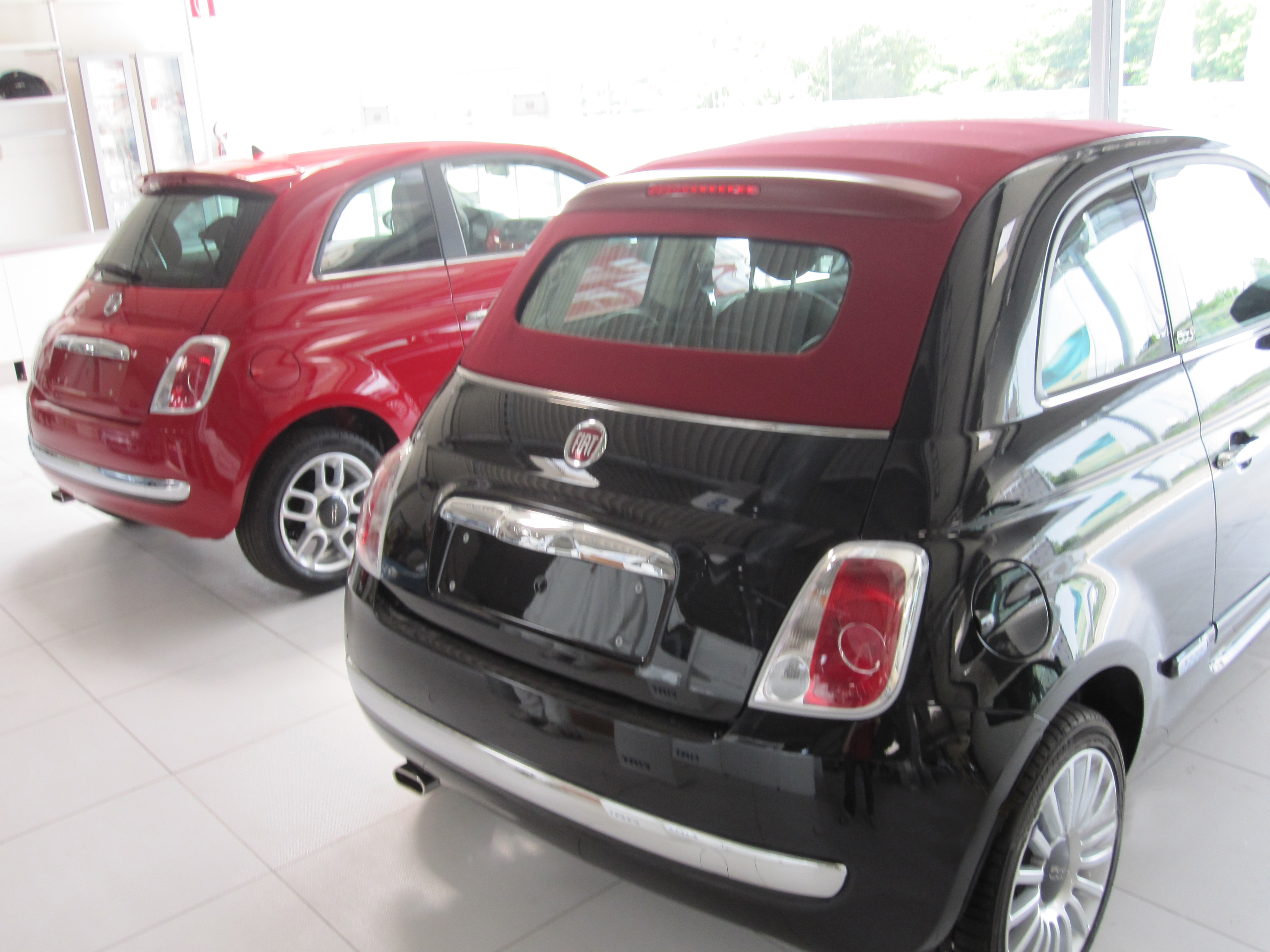 Fiat 500 e Fiat 500C in un concessionario